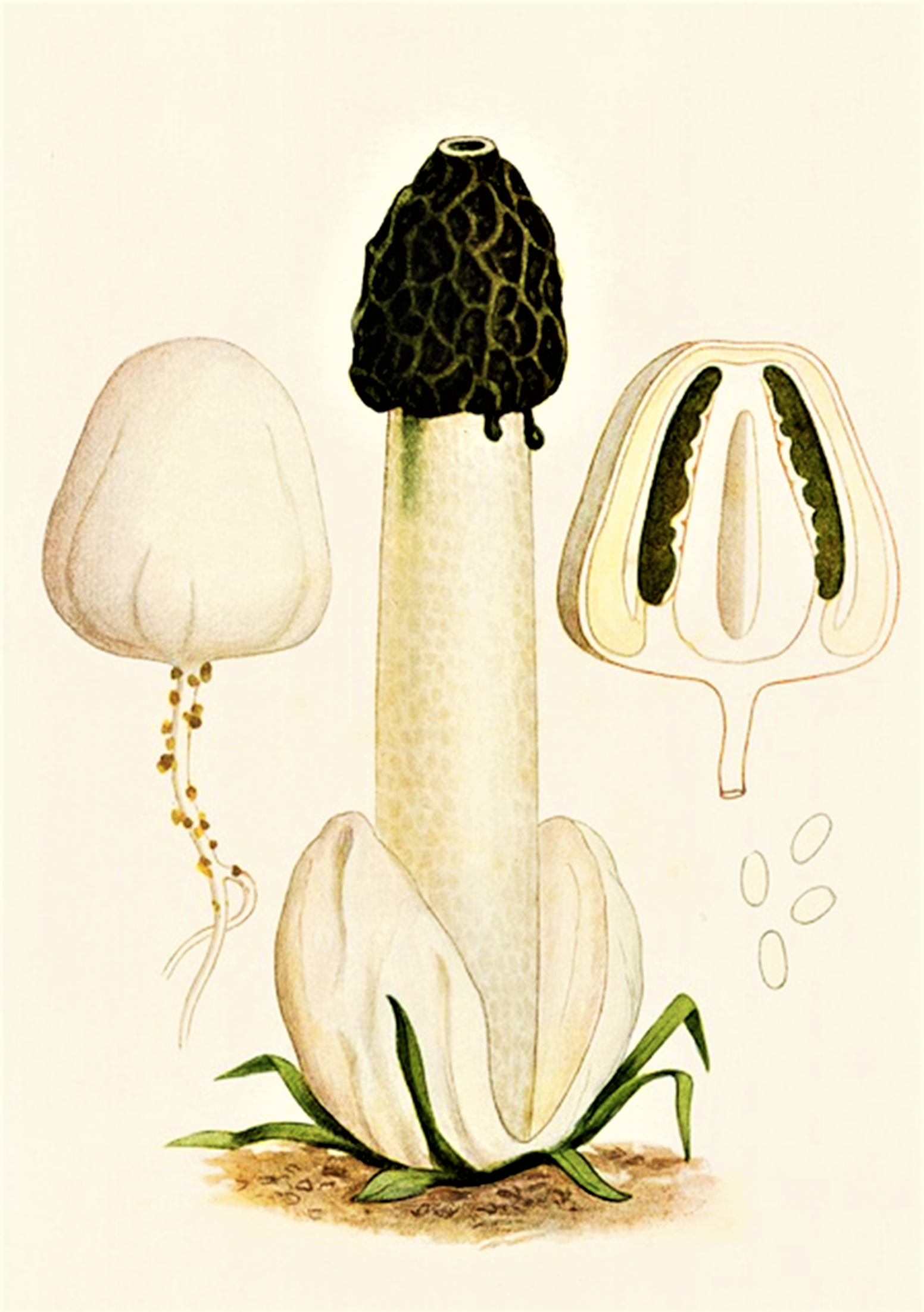 Giacomo Bresadola: Ithyphallus impudicus (L., 1753) Fr. (1823), heute Phallus impudicus L. (1753)